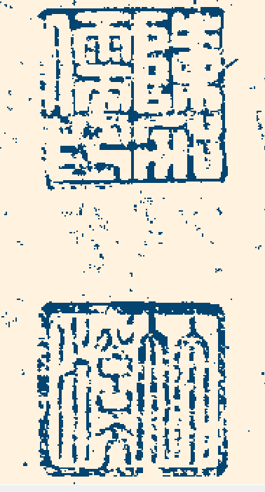 雍正七年己酉科舉人陳加儒印章